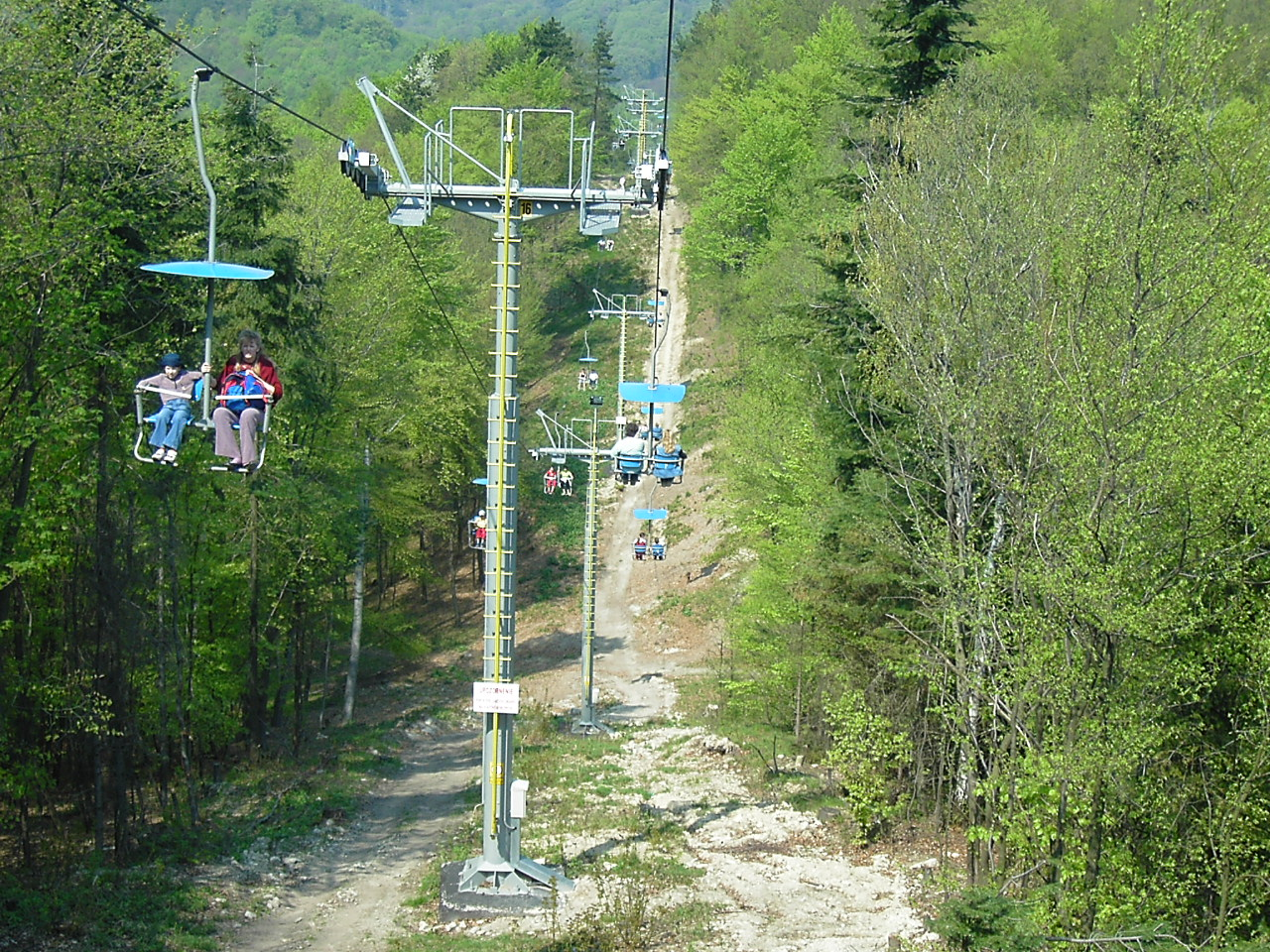 Cableway in Kamzík, Bratislava, Slovakia